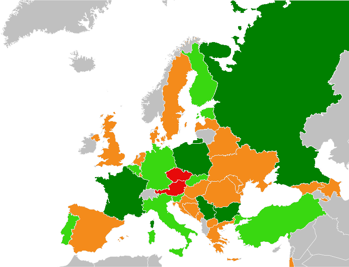 Eliminacje do Mistrzostw Europy w Piłce Siatkowej Mężczyzn 2011